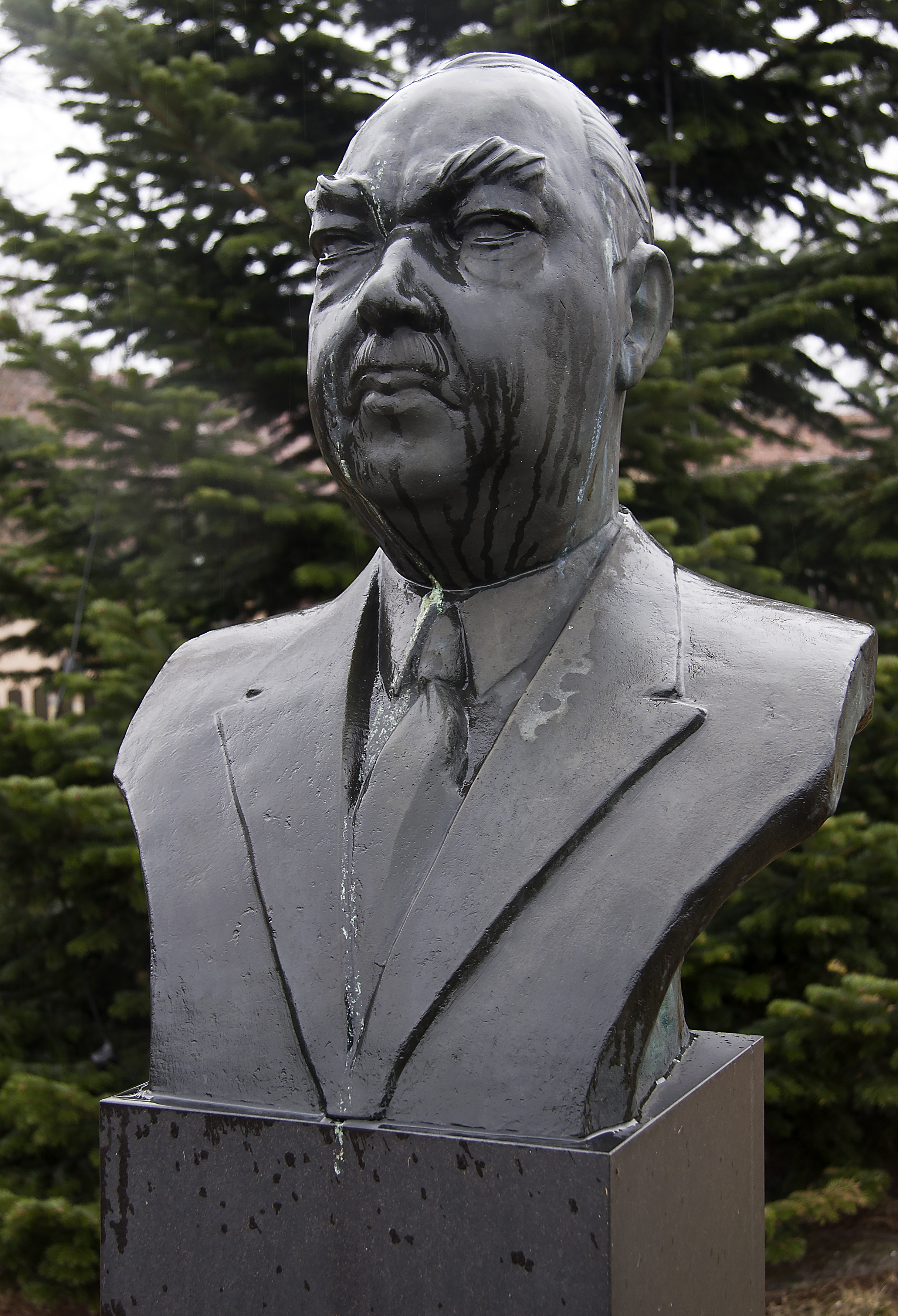 Byst av industrimannen Bror Färe. Bysten står vid Sibbhults kyrka och fundamentet bär texten: TILLÄGNAD FÄREKONCERNENS GRUNDARE DIREKTÖR BROR FÄRE PÅ 70-ÅRSDAGEN 11/4 1958 TJÄNSTEMÄNNEN